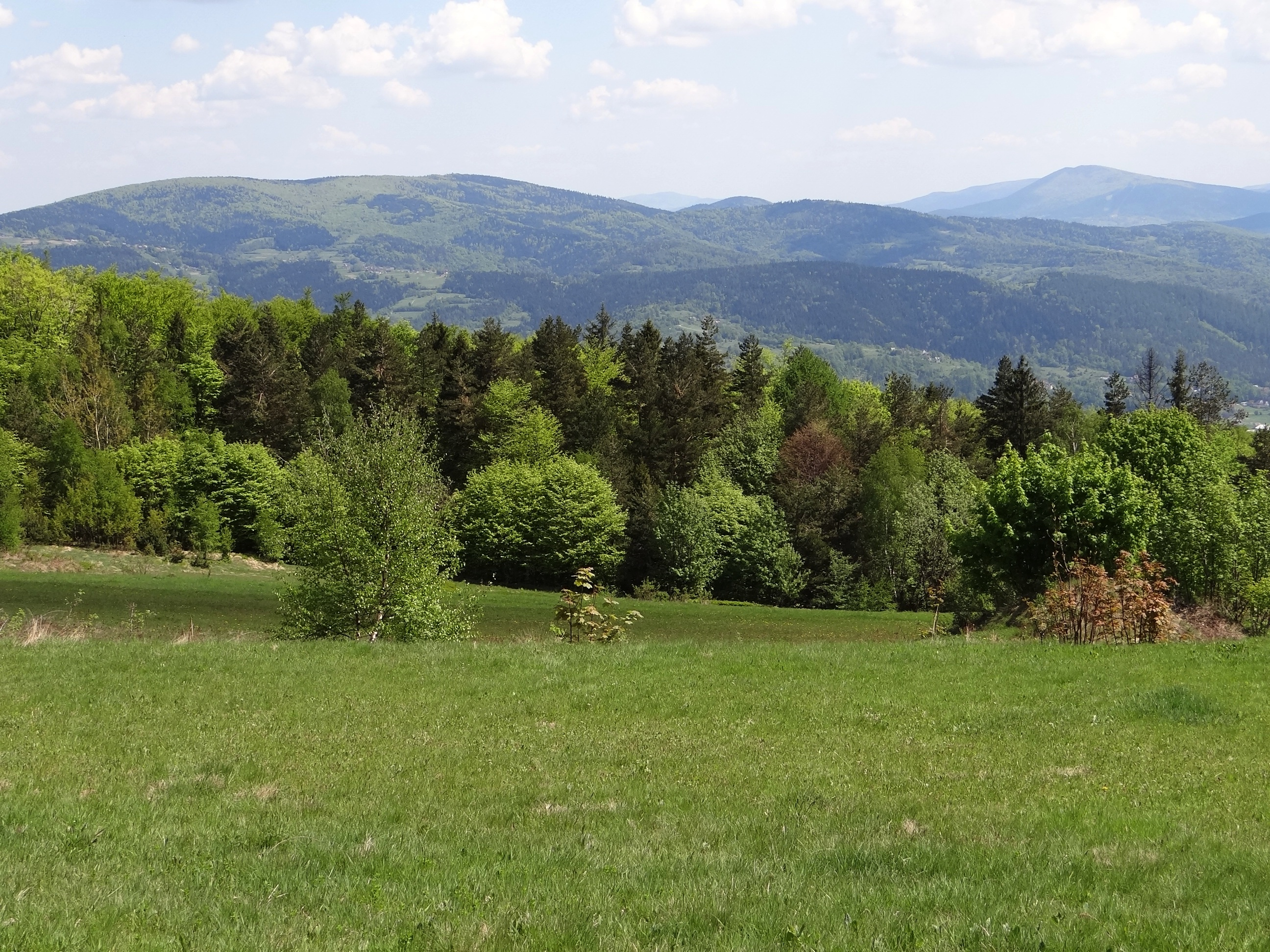 Polana Pękalówka w Beskidzie Makowskim i widok na Beskid Wyspowy (Łysina, przełęcz Weska, Patryja, Bania)